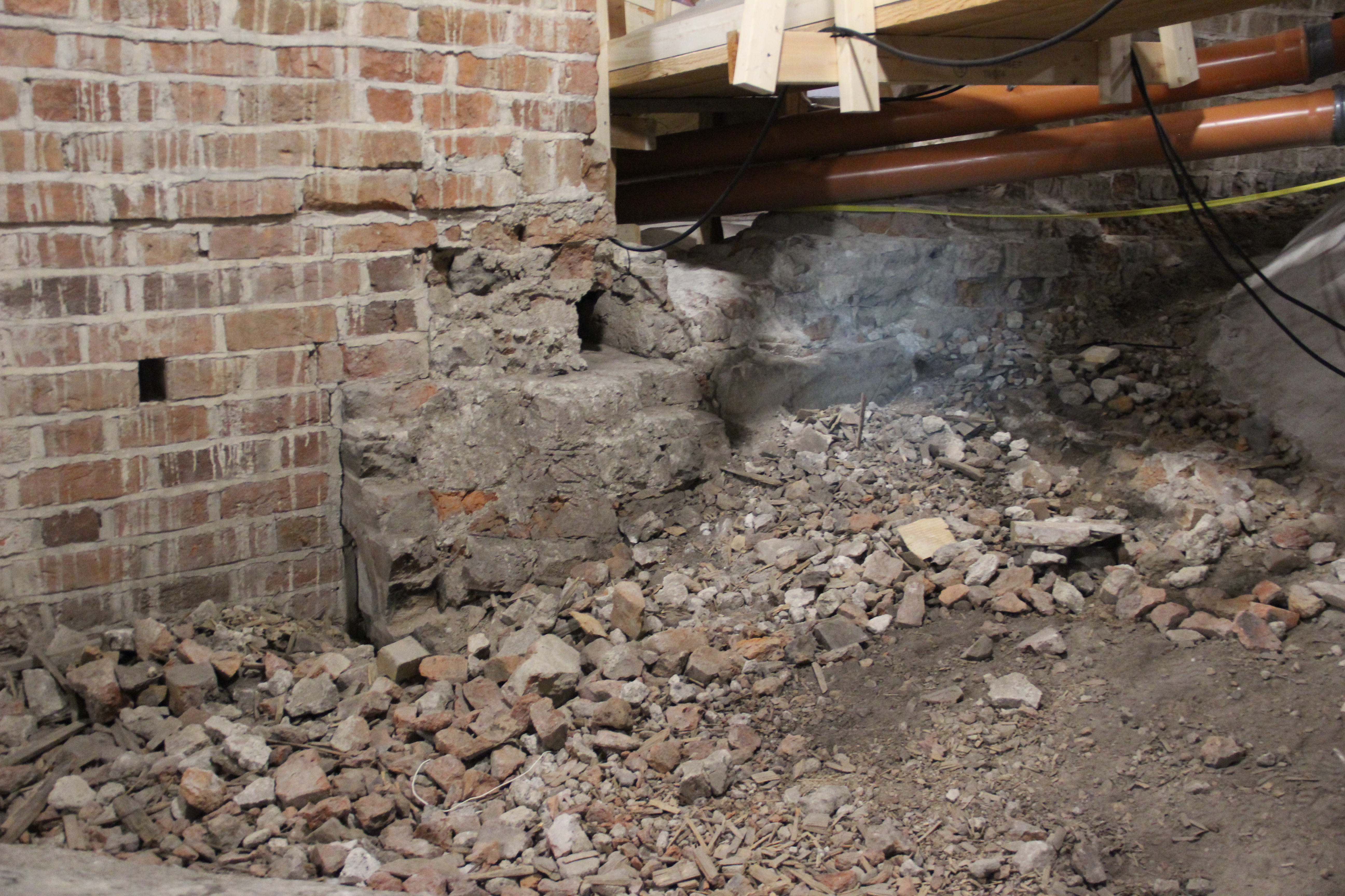 En inmurad och avbränd del av en träbjälke sitter i murverket i norra korsarmens norra gavel. Murverket har ingått en del av den tidigare romanska kyrkan. Troligen rör det sig om ett inre remstycke som legat på murkrönet till norra korsarmens västra vägg.